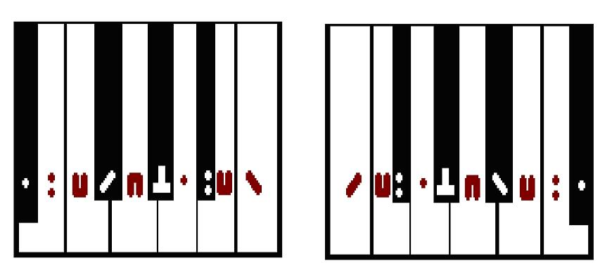 pamz, opera propria, rappresentazione segni stenografici della macchina Michela, GFDL